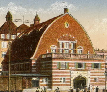 mit Fischhalle, Seegarten und Schloss (hinten rechts).